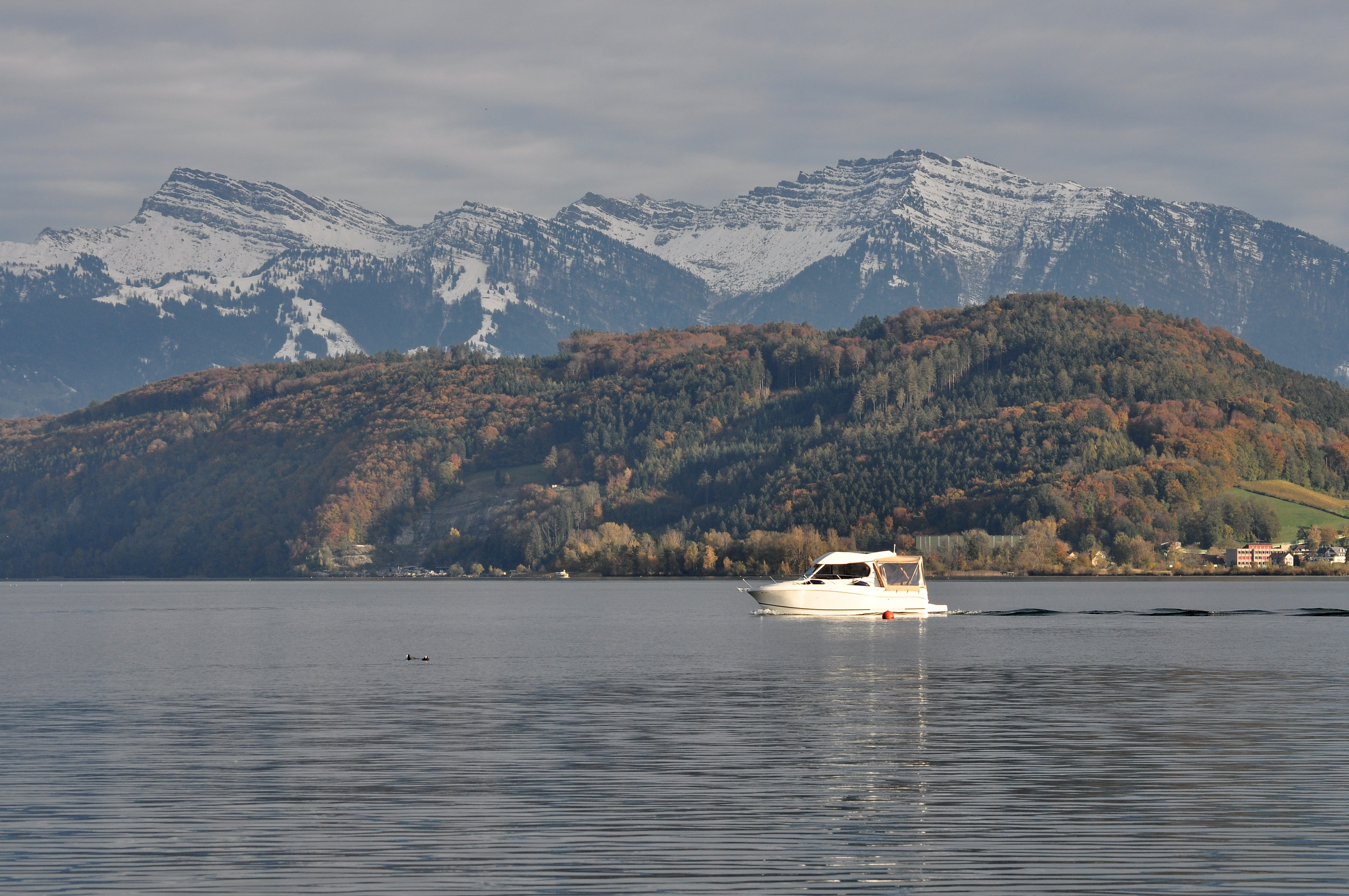 Buechberg and Obersee (upper Lake Zürich), as seen from Stampf in Jona (Switzerland), Speer and Federispitz in the background.